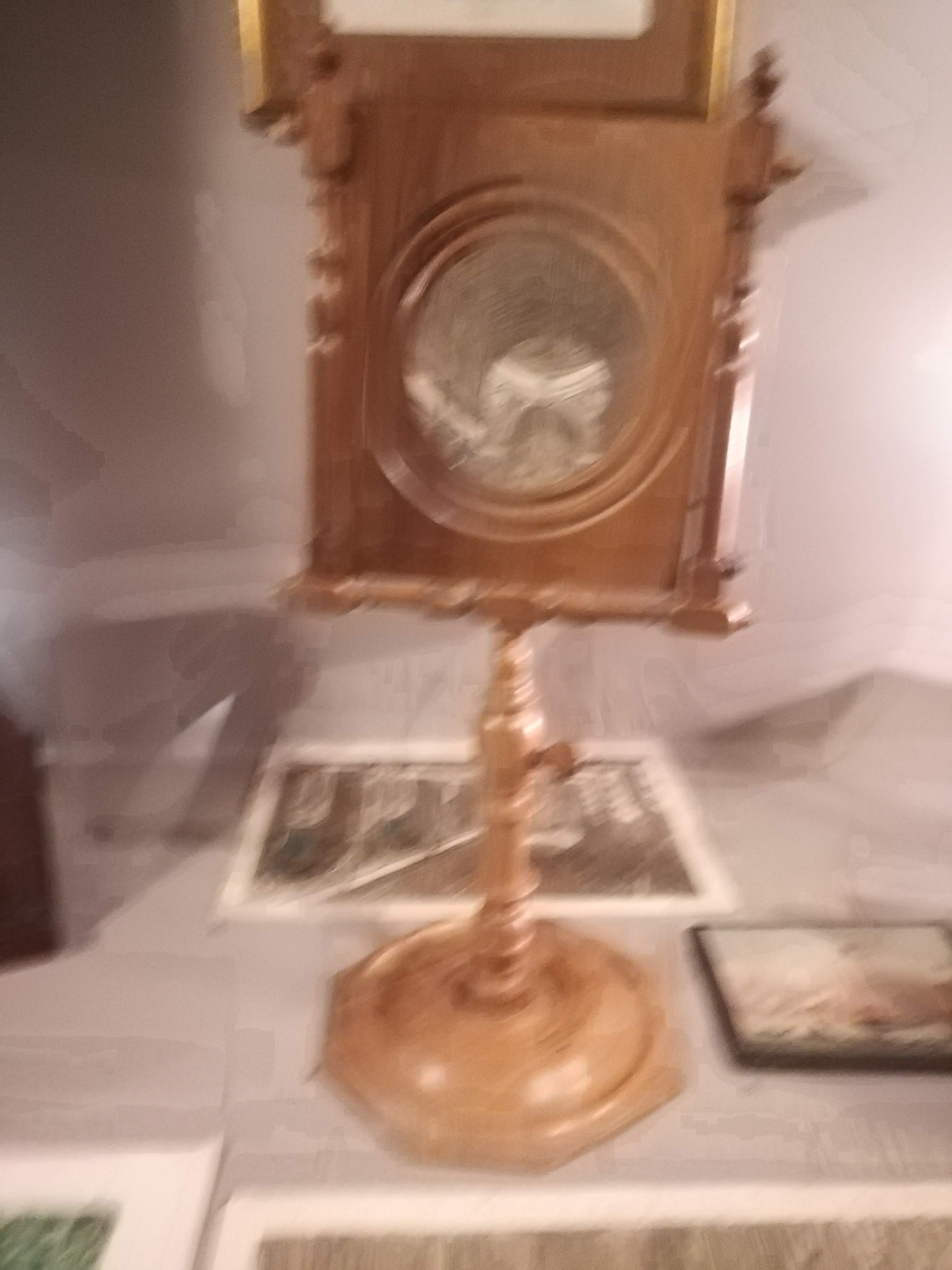 Aparell del Zoograscopi